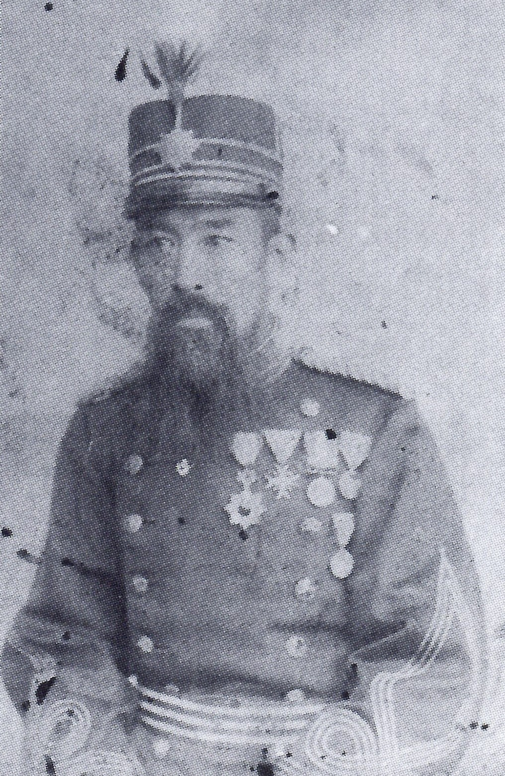 内田正学の肖像写真。